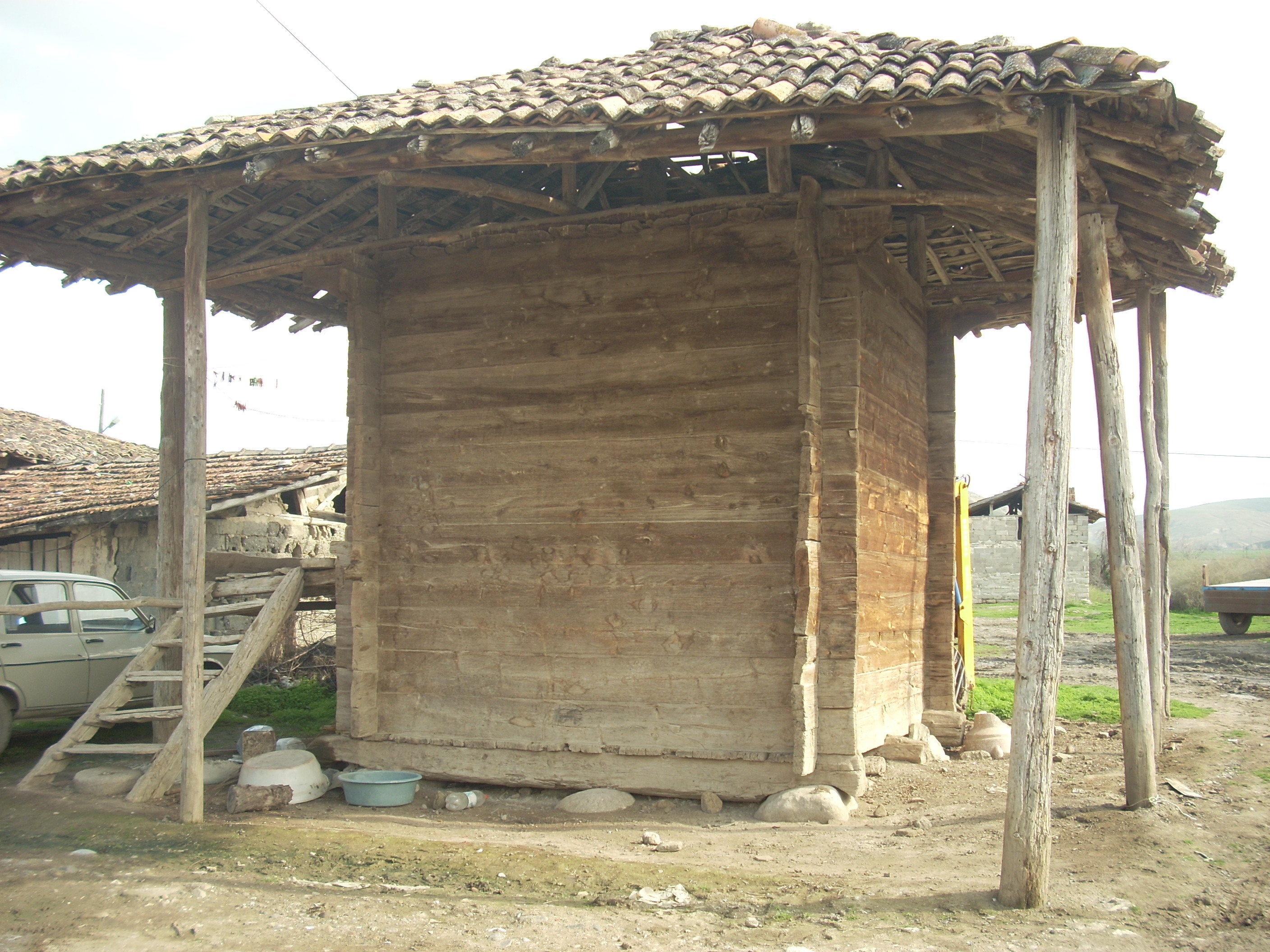 Kumçelteği, Çorum, Turkey